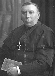 Franz Schauerte (*15.03.1848 - †6.09.1910 in Schmallenberg/Germany)